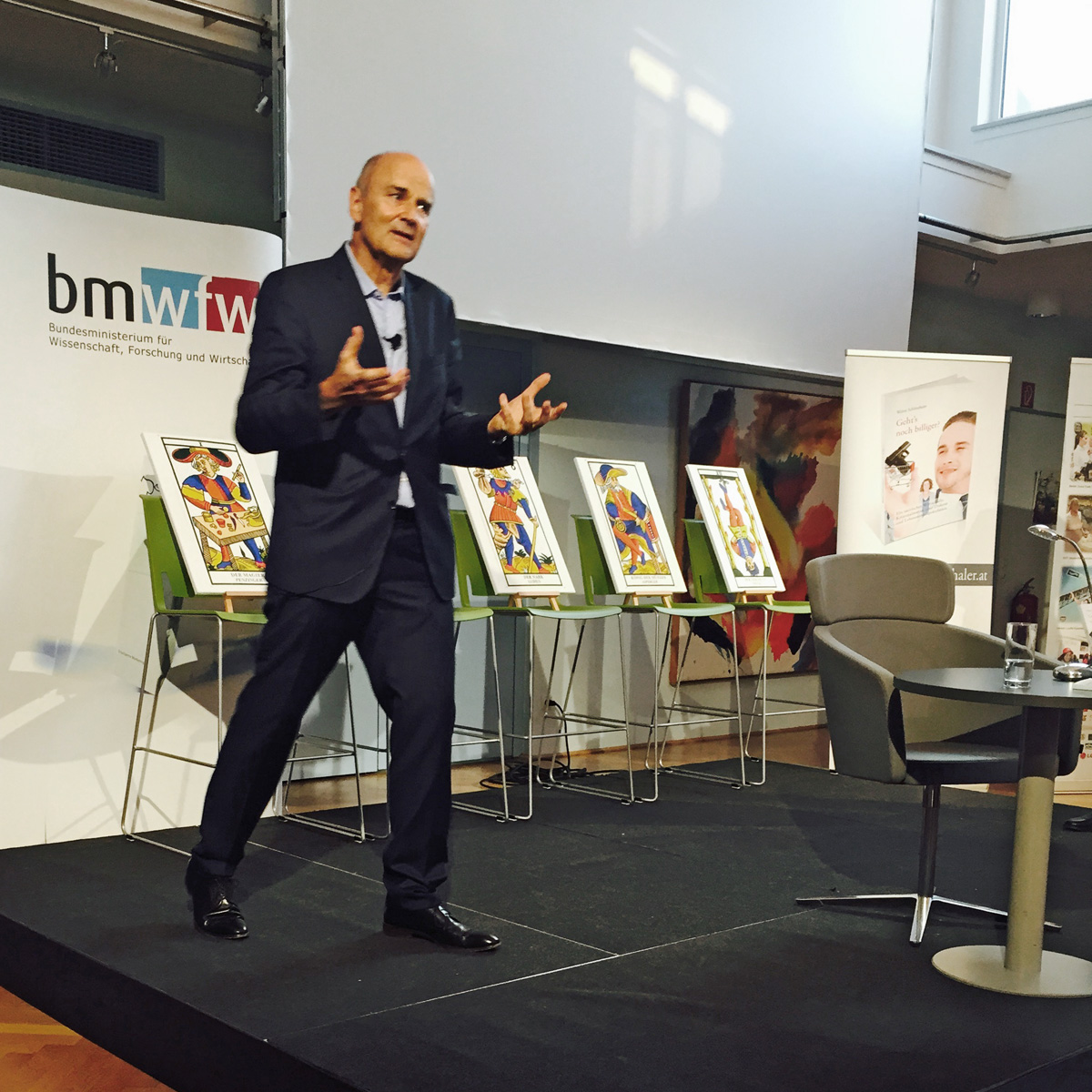 Vortrag von Herrn Mag. Schönthaler im Marketingclub Österreich im Unicredit Congress-Center „Am Kaiserwasser“.